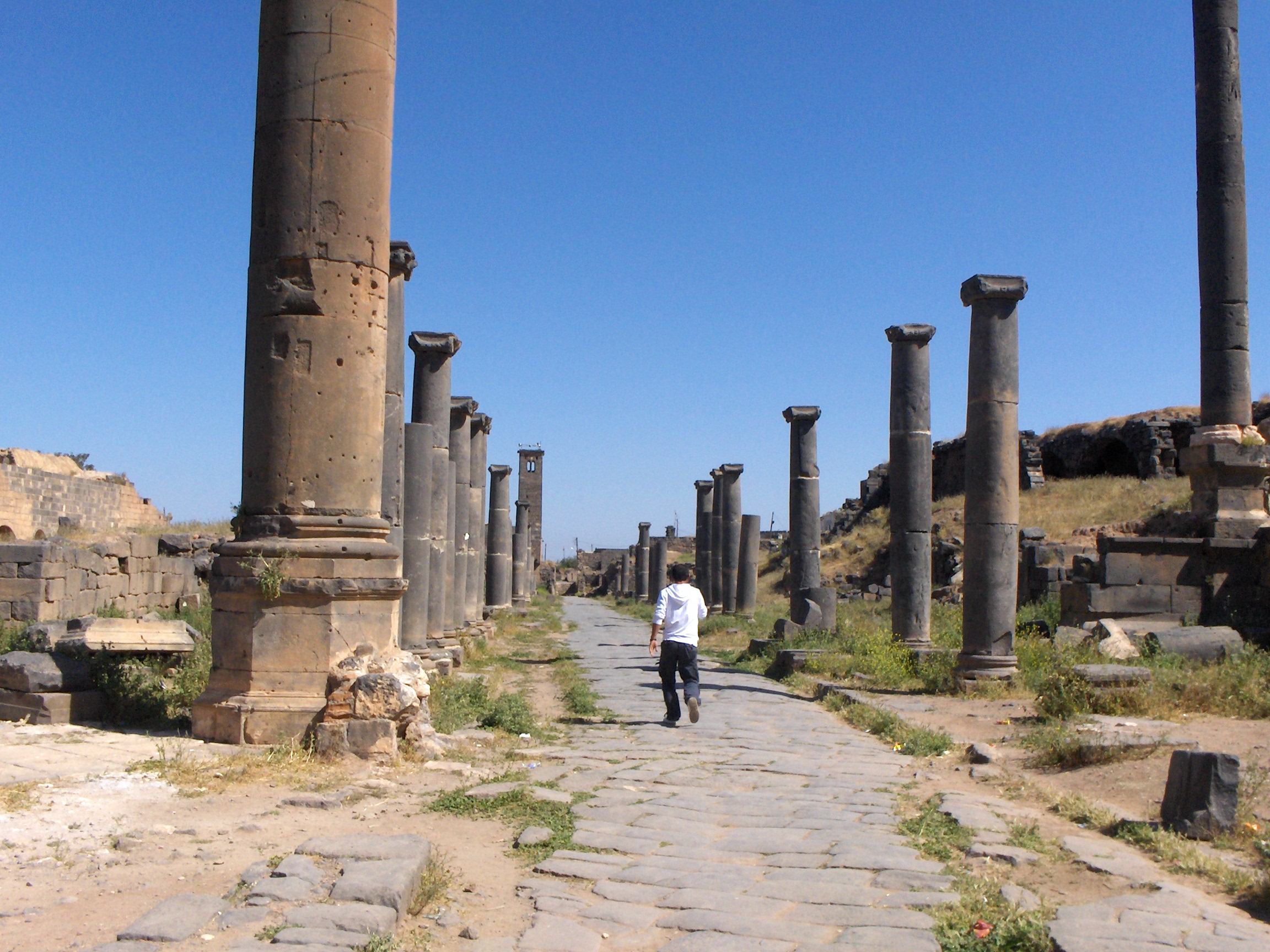 Decumano massimo di Bosra, Siria